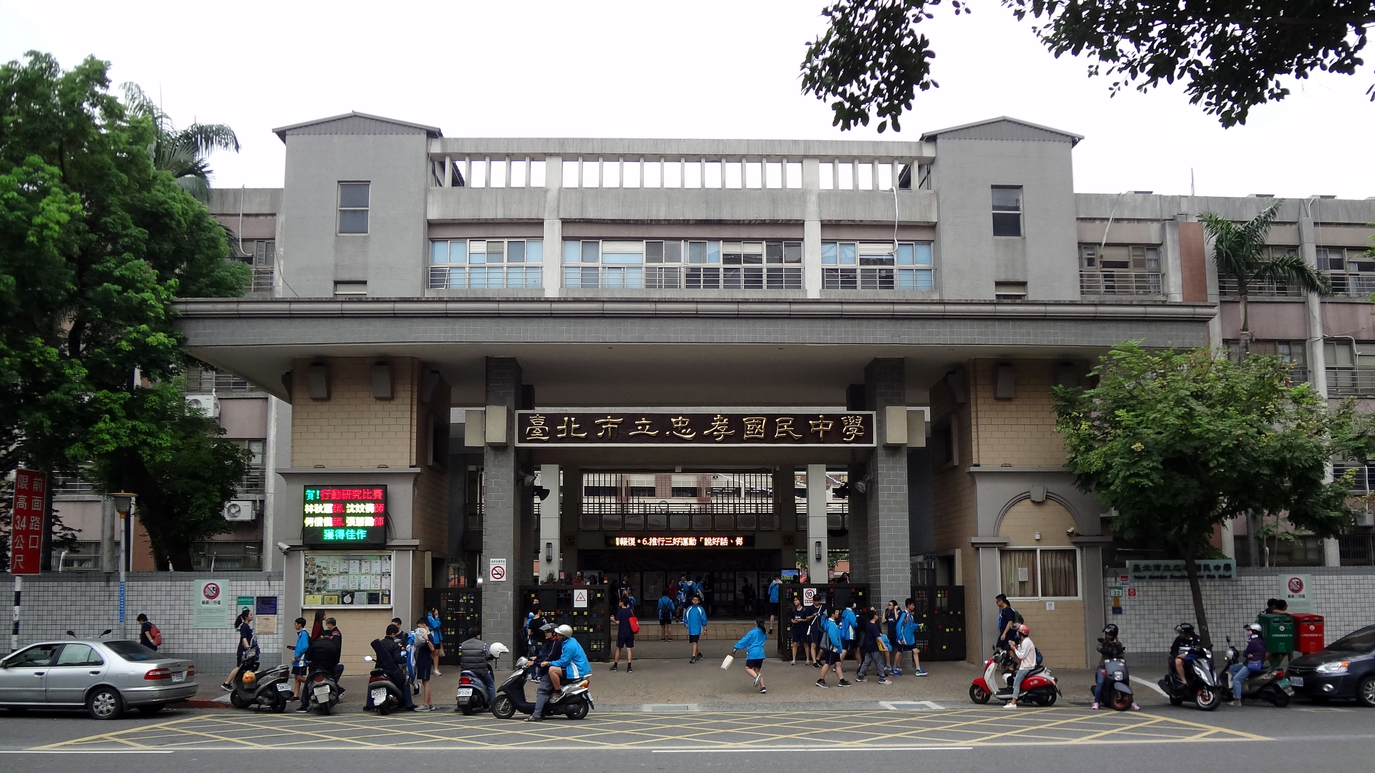 臺北市立忠孝國民中學大門。